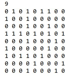 DoThiEuler_input